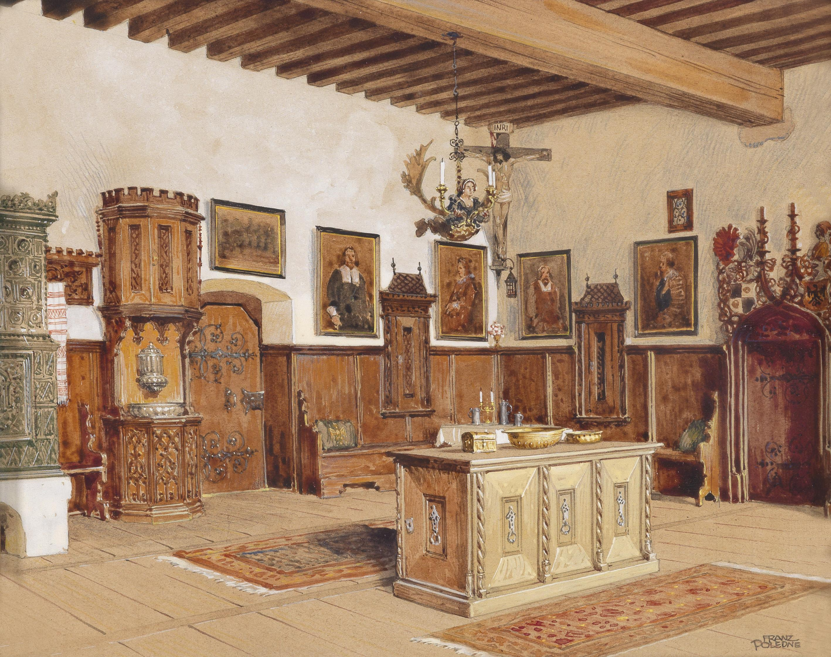 Interieur Burg Kreuzenstein, Zimmer mit Schreibtisch